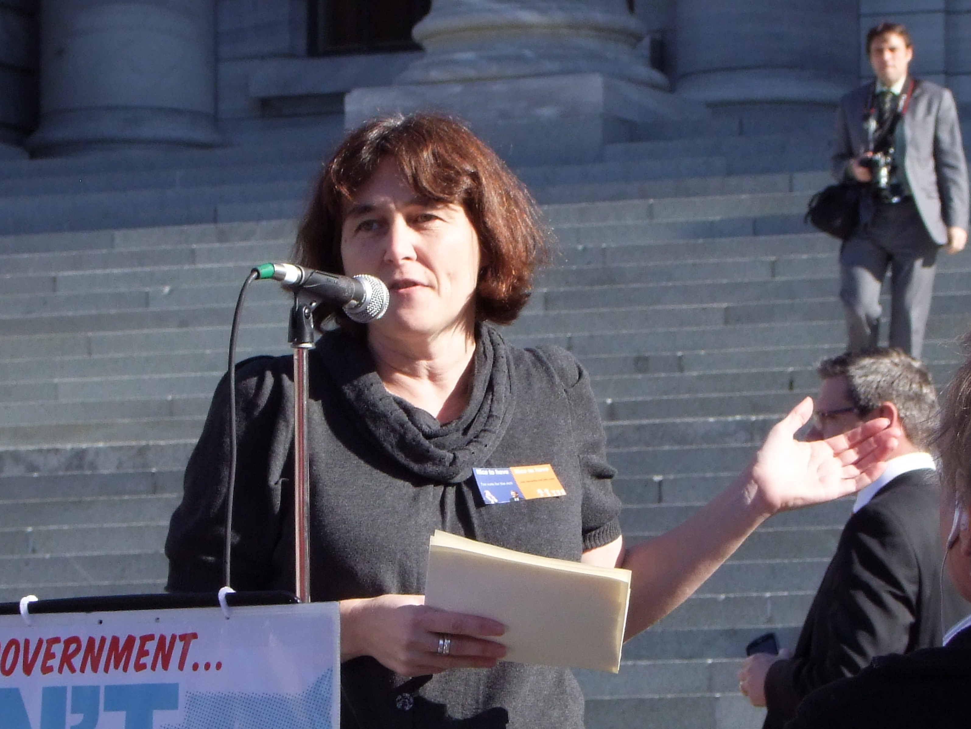 Helen Kelly, CTU